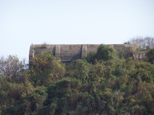 中文（香港）: 火藥洲火藥庫